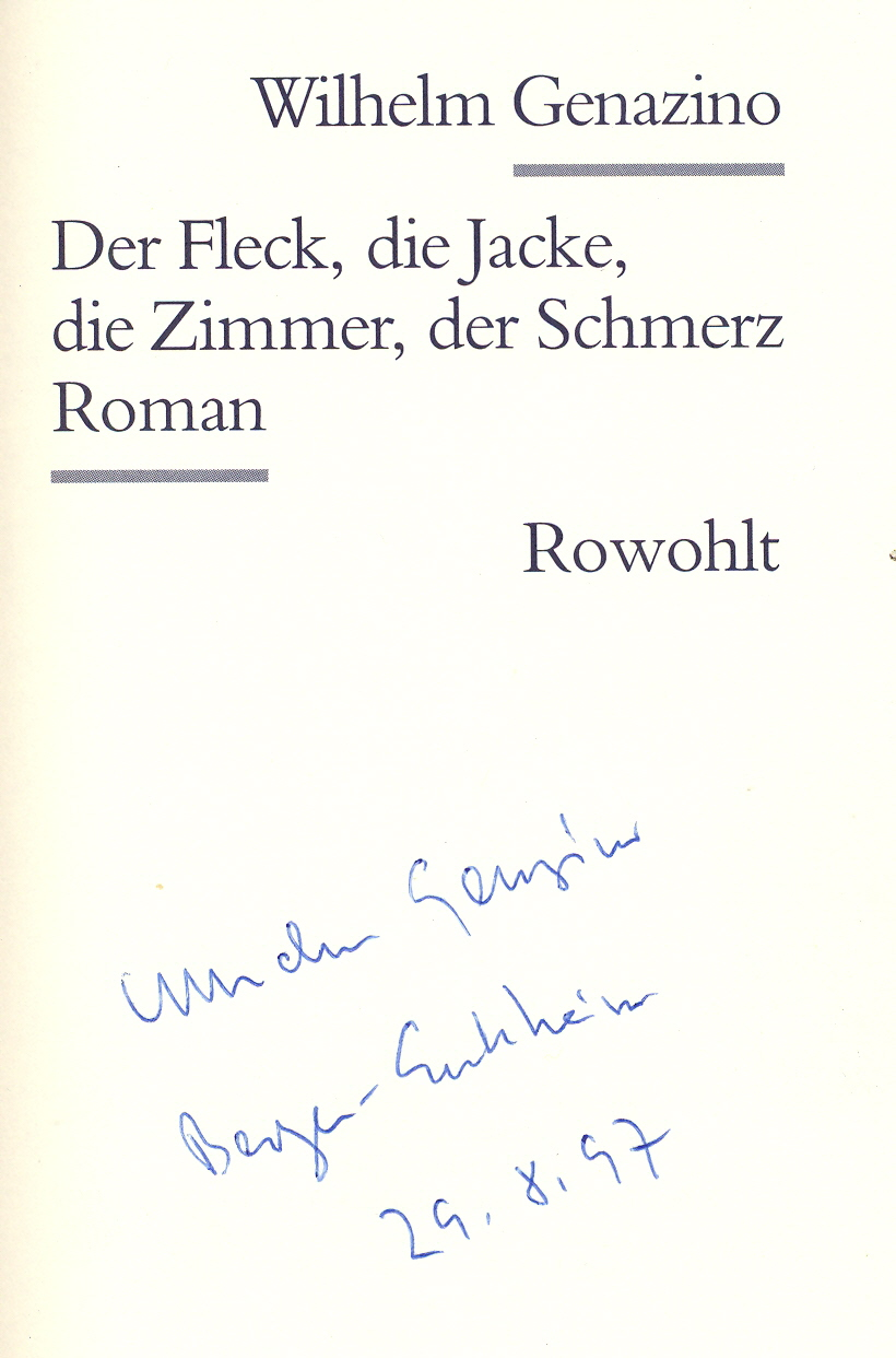 Autogramm von Wilhelm Genazino